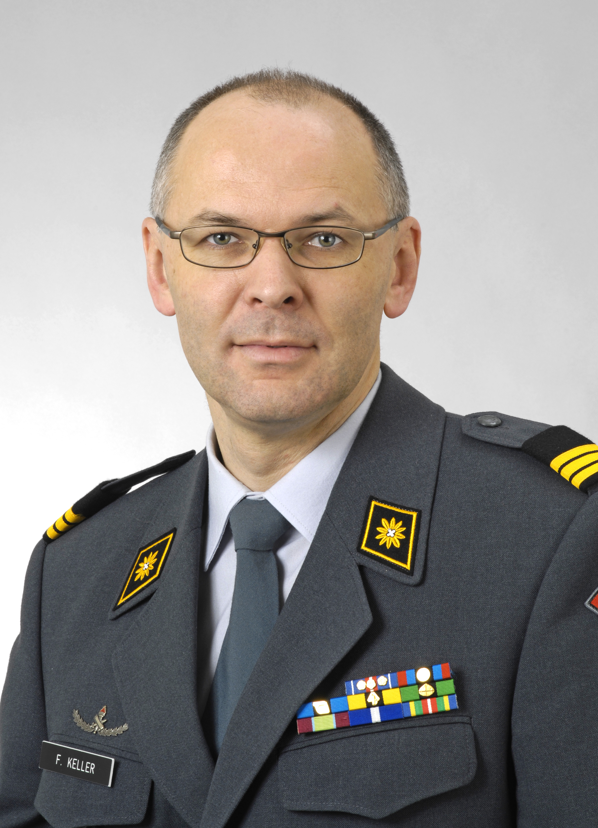 Porträt des Schweizer Berufsoffiziers Fredy Keller